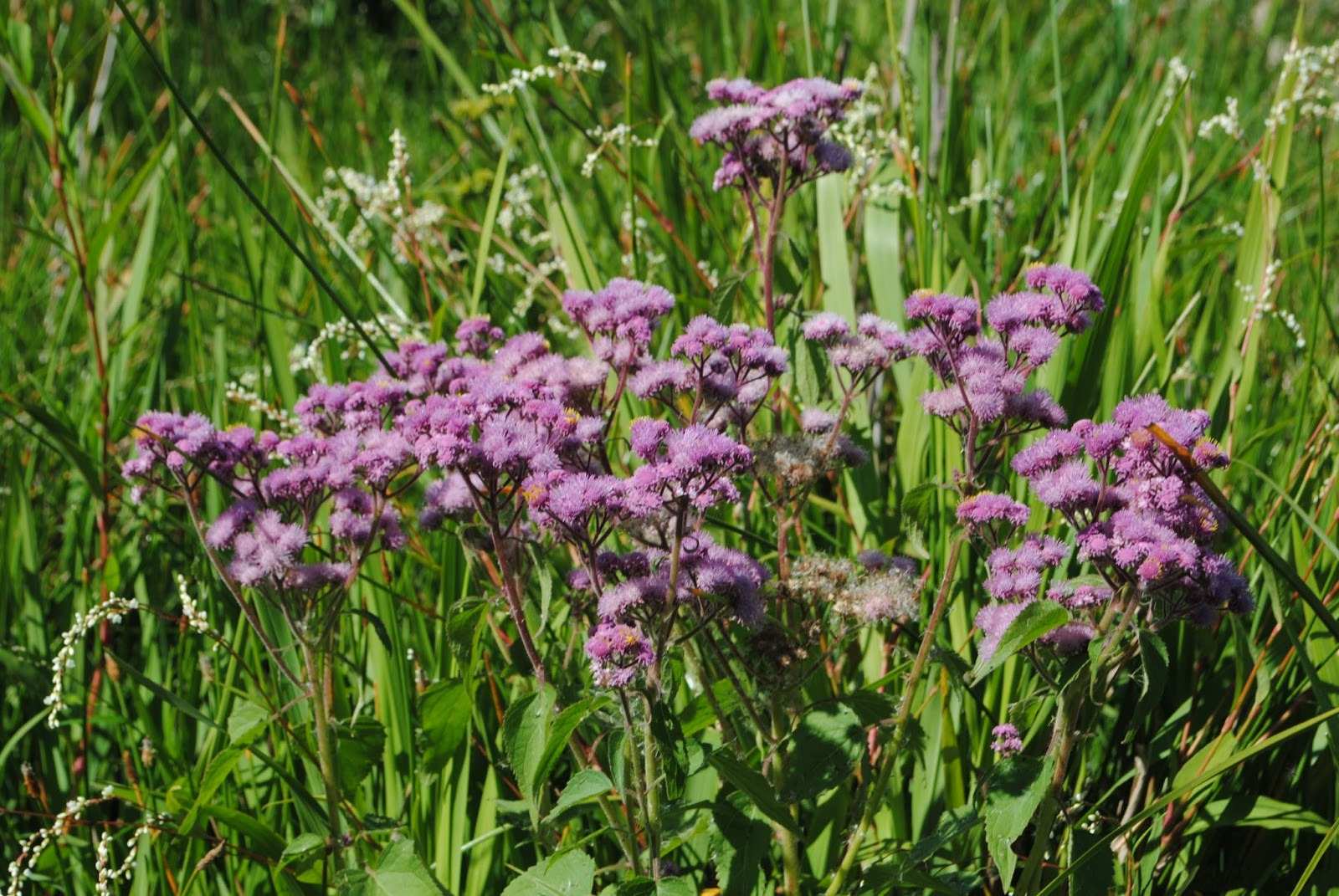 Eupatorium hecatanthum. Fotos tomadas en pajonal al margen del Río Negro en Palmar, departamento de Soriano, Uruguay.